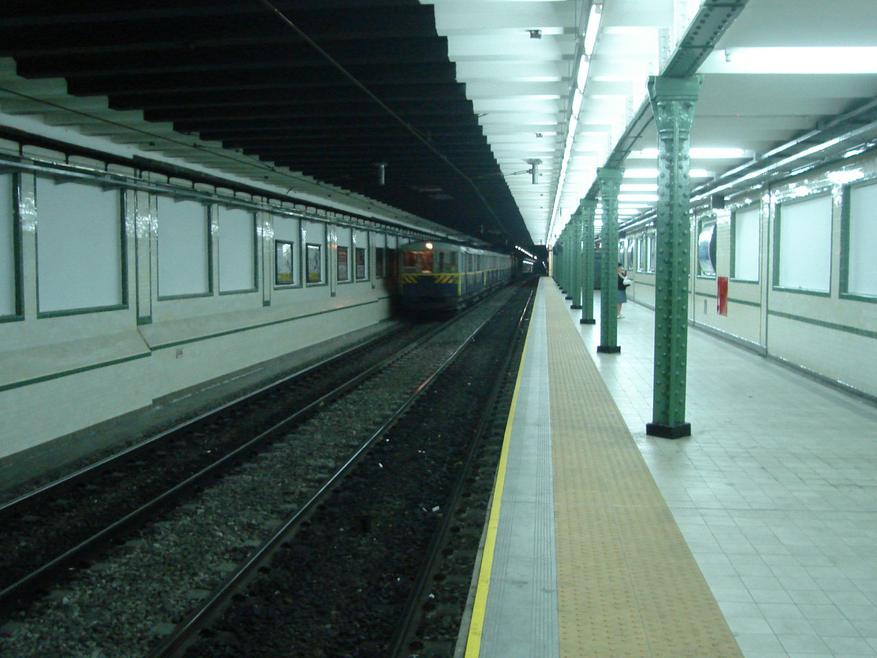 Formación de coches Le Brugeoise pasando por la estación Pasco de la línea A del Subte de Buenos Aires.